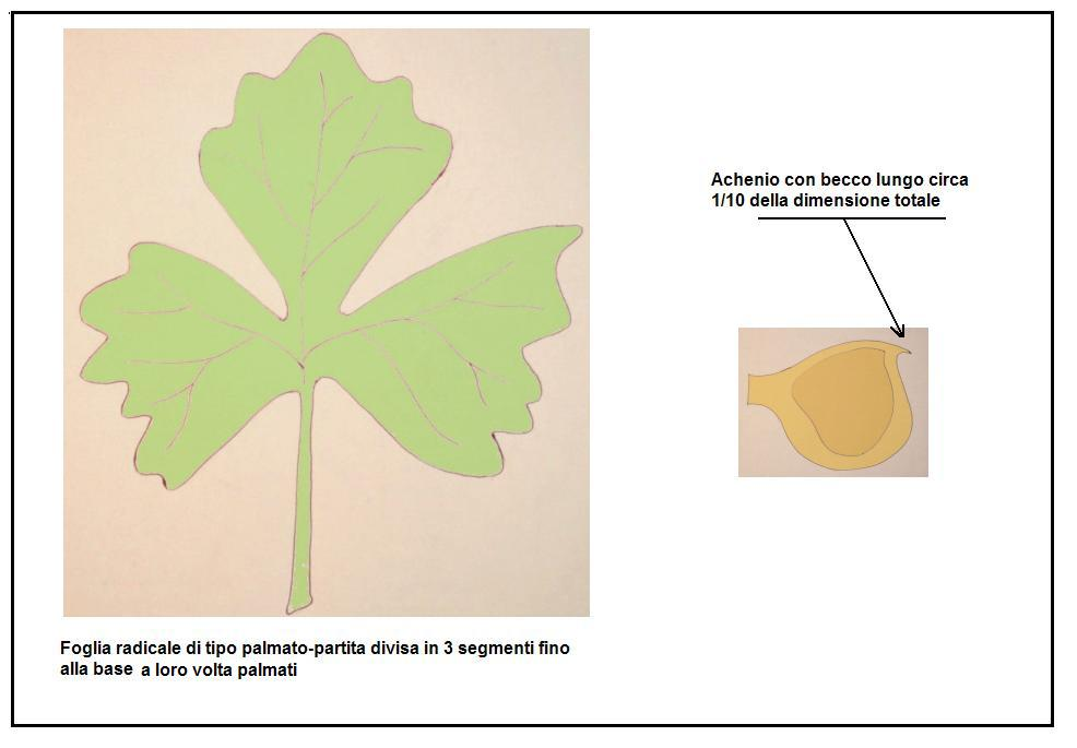 Ranunculus carinthiacus